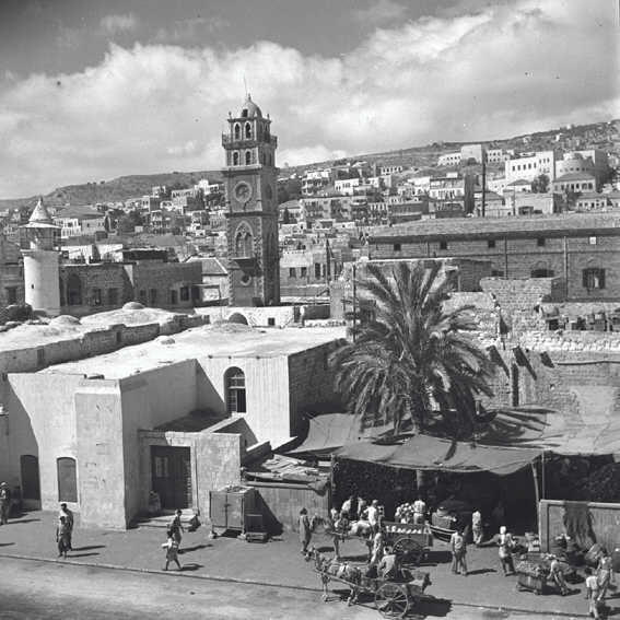 חיפה - מראה חלקי